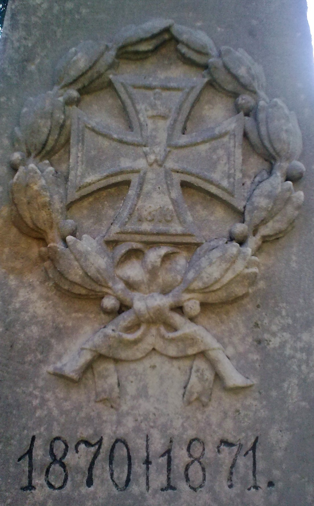 Krajanów. Krzyż na pomniku ofiar wojny francusko-pruskiej